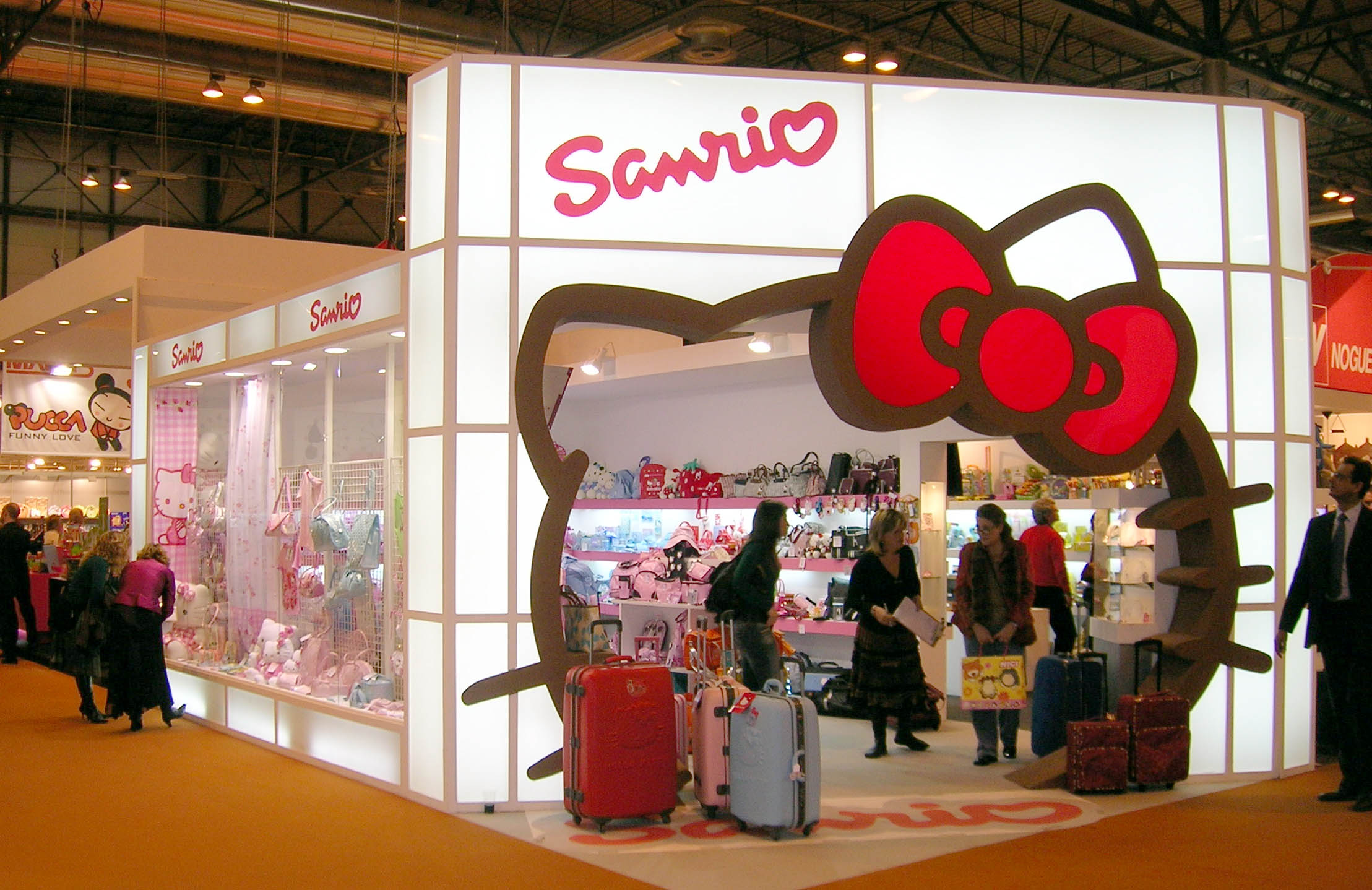 Esquina del stand de Noguera y Vintró, concesionaria de la marca Hello Kitty (de la empresa japonesa Sanrio) para España, en el Recinto Ferial Juan Carlos I de Madrid.